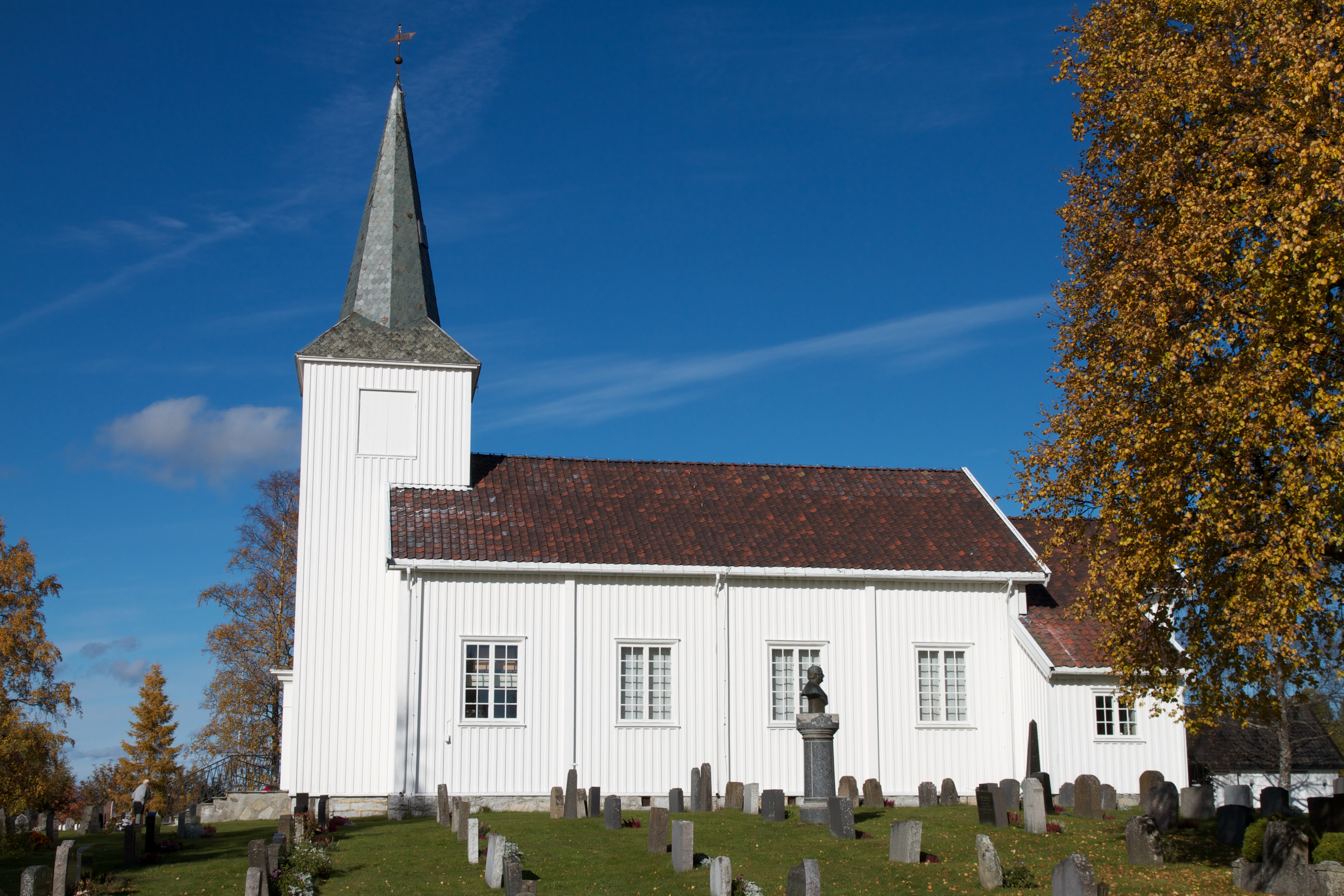 Eina kirke.